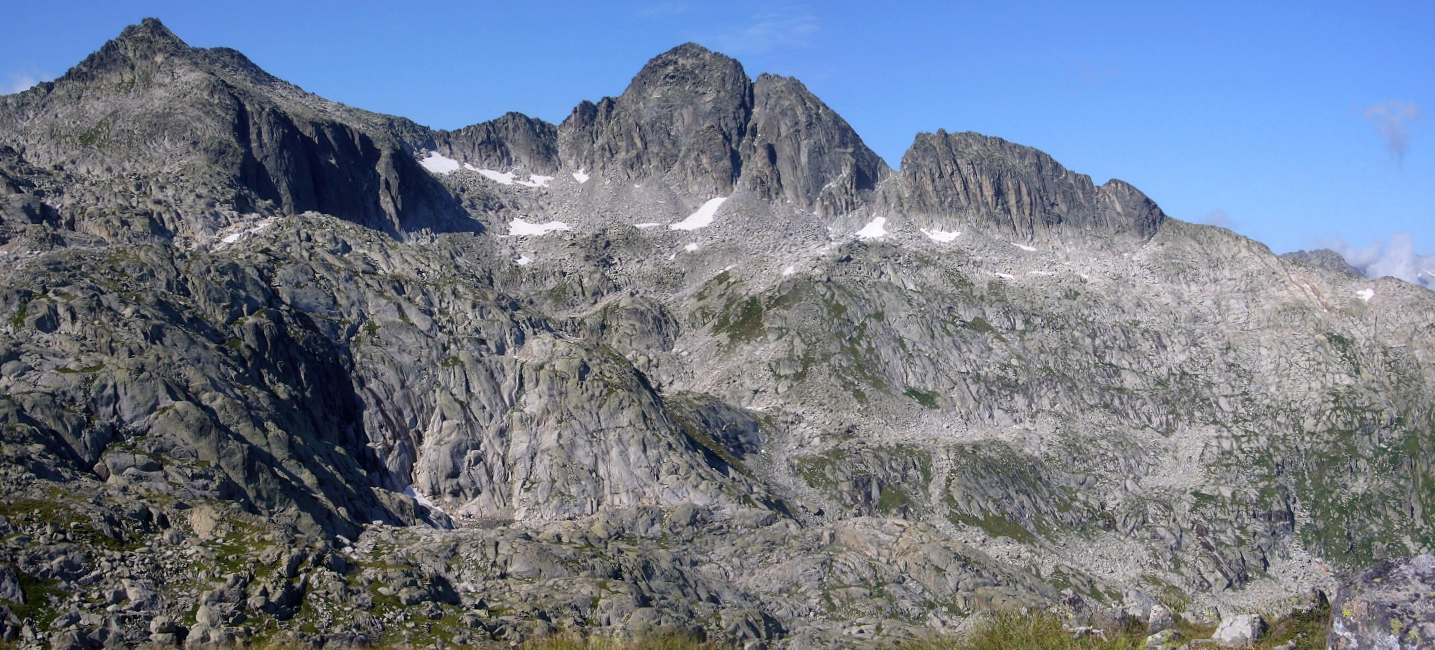 Pic Oriental, la Creu de Colomèrs i Tuqueta deth Pòrt, vists des del Tossal dels Óssos; Naut Aran, Vall d’Aran, Catalunya